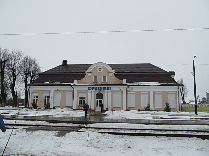 Ляпешкі. Станцыя Юрацішкі